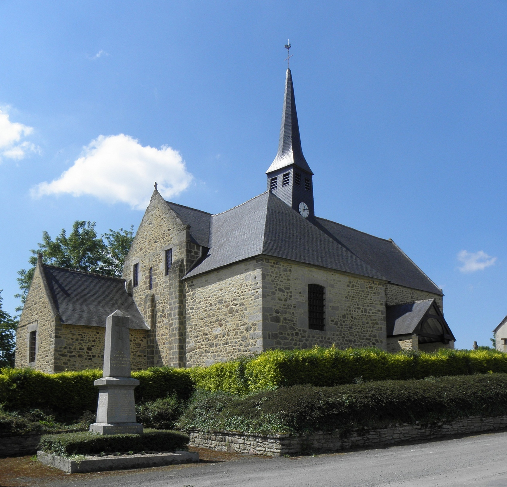 Église Saint-Jean de Saint-Maden (22). Chevet et flanc nord.